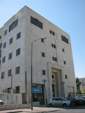 חזית מבנה משכן גנזך המדינה בשכונת מקור חיים בירושלים